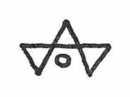 Handelzeichen der Welser-Vöhlin-Gesellschaft